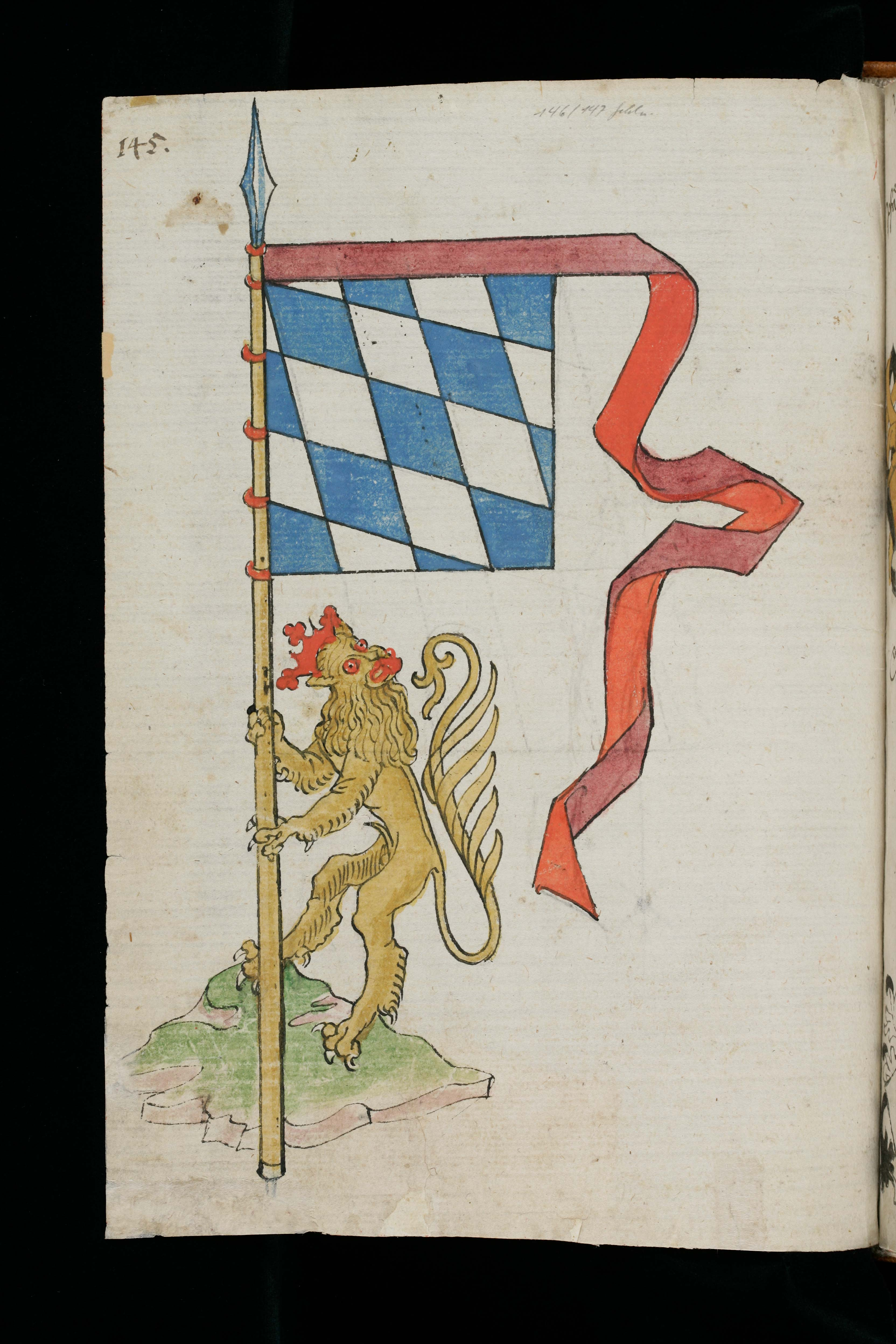 Wappenbuch des St. Galler Abtes Ulrich Rösch; Stiftsbibliothek St. Gallen, Cod. sang. 1084 Wappen